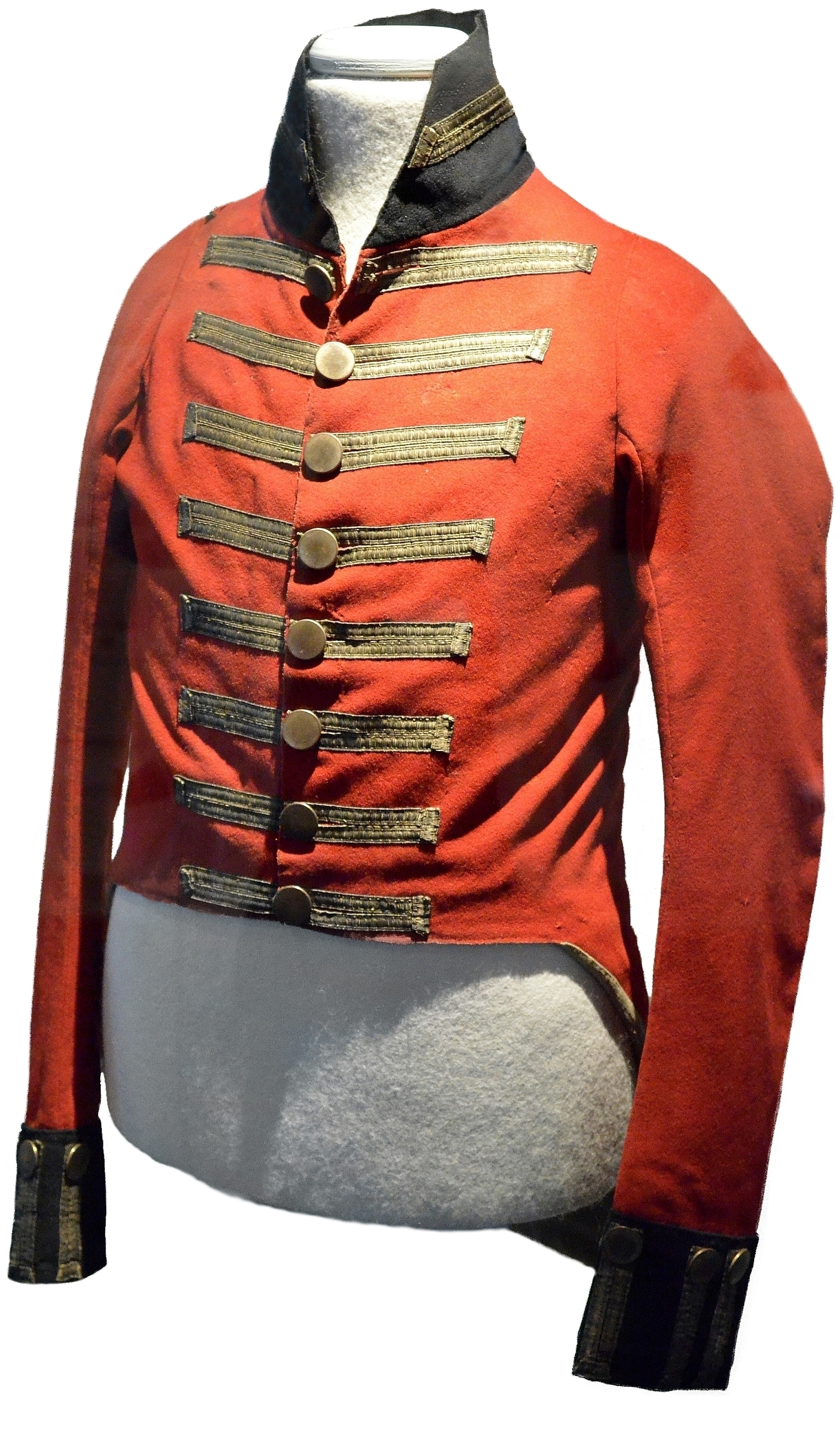 Hamburg, Museum für Hamburgische Geschichte: Uniformrock eines Offiziers der King’s German Legion (KGL). Der Rock soll angeblich von Georg Hartog Gerson, KGL-Truppenarzt, am 18. Juni 1815 bei der Schlacht bei Waterloo getragen worden sein.